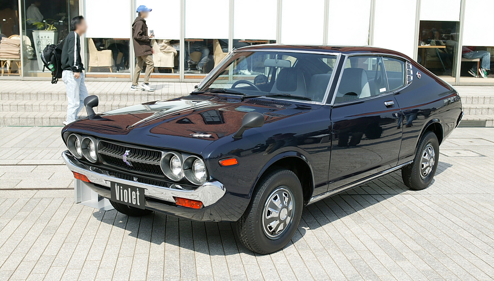 Datsun Violet 710 2door Hardtop.